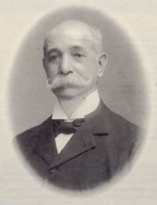 Foto di Saverio De Bellis